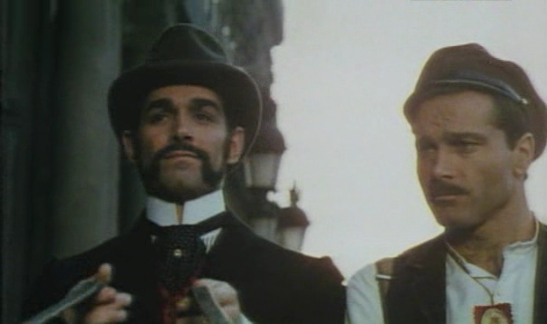 Screenshot del film I guappi (1974) di Pasquale Squitieri.